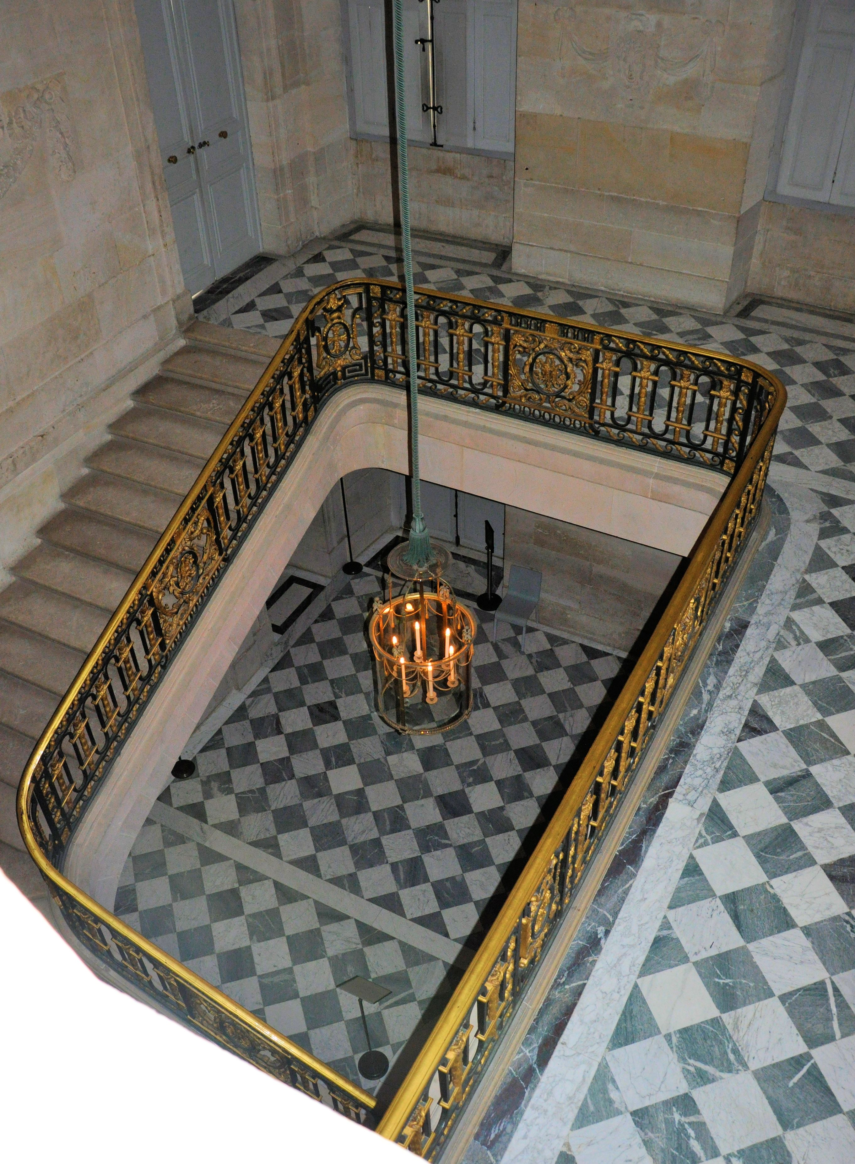 Petit Trianon - Grand escalier et vestibule